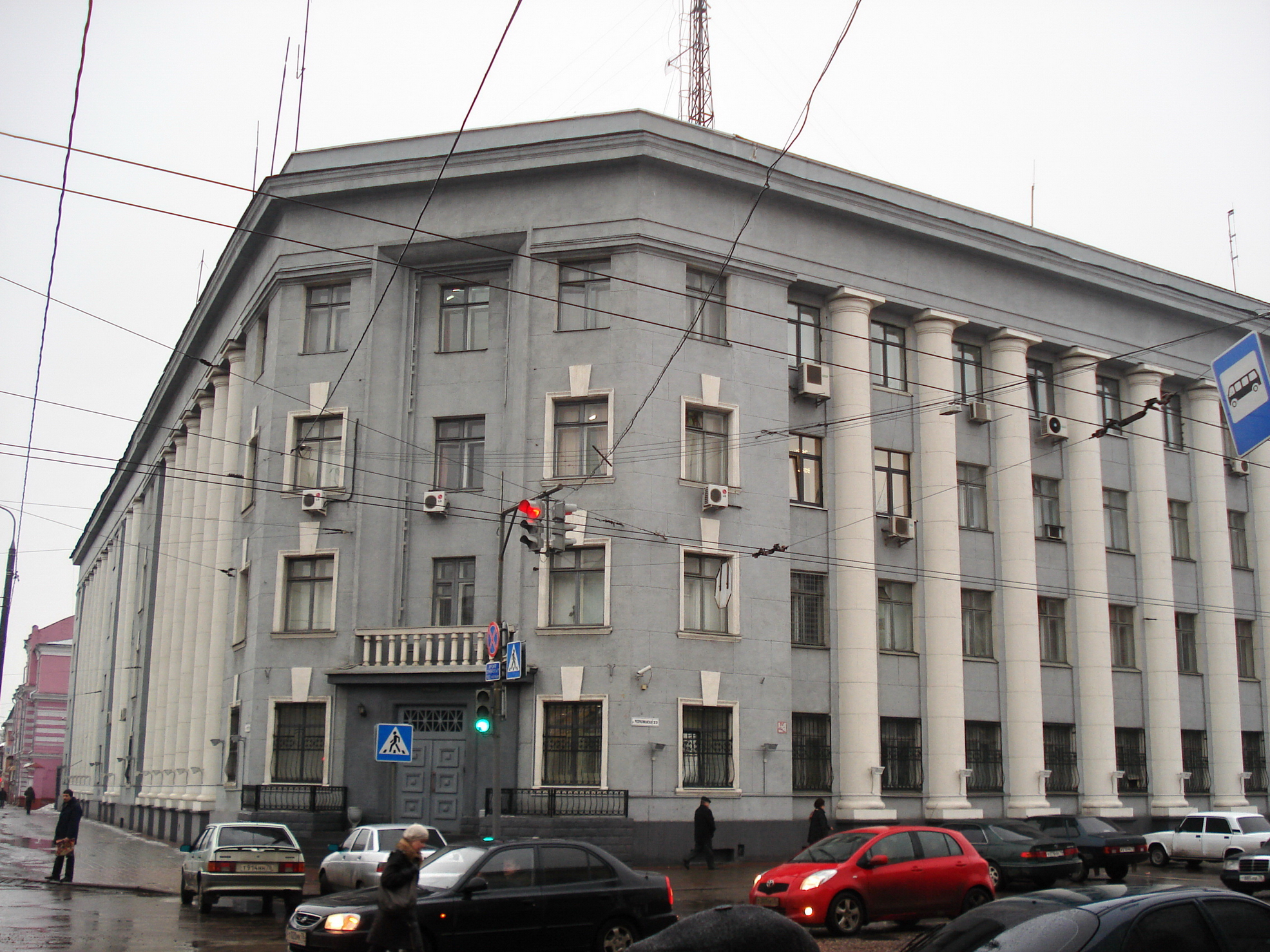 Здание УВД в Ярославле («Серый дом»).